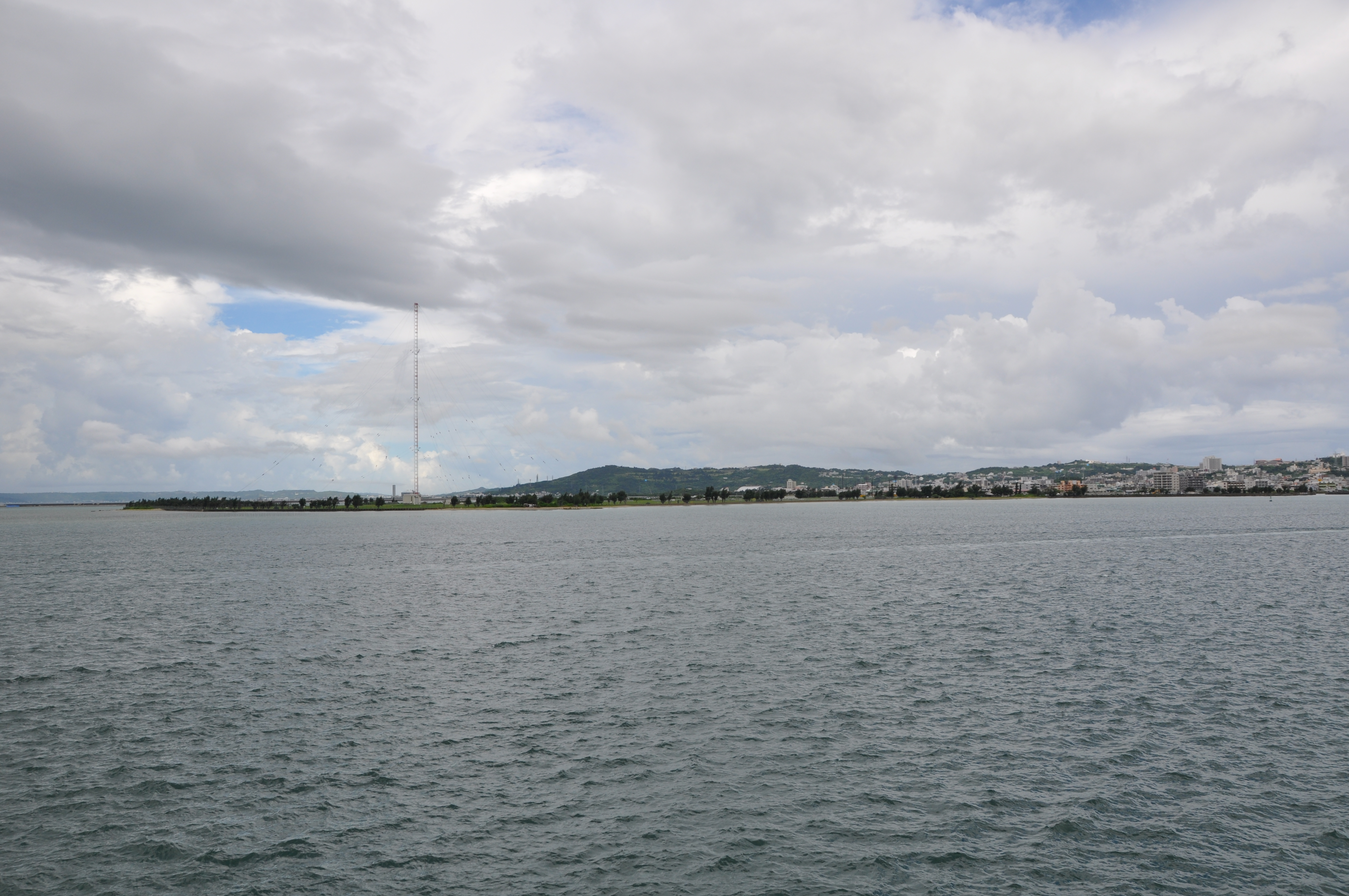 泡瀬通信施設